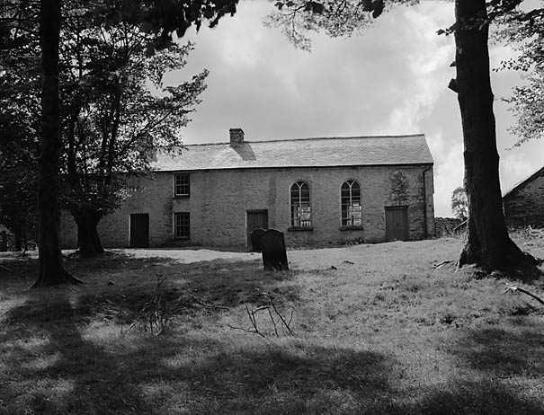 Teitl Cymraeg/Welsh title: Soar y Mynydd, y capel mwyaf anghysbell yng Nghymru Ffotograffydd/Photographer: Geoff Charles (1909-2002) Dyddiad/Date: September 8, 1955 Cyfrwng/Medium: Negydd ffilm / Film negative Cyfeiriad/Reference: (gch08576) Rhif cofnod / Record no.: 3368888 Rhagor o wybodaeth am gasgliad Geoff Charles yn Llyfrgell Genedlaethol Cymru More information about the Geoff Charles Collection at the National Library of Wales